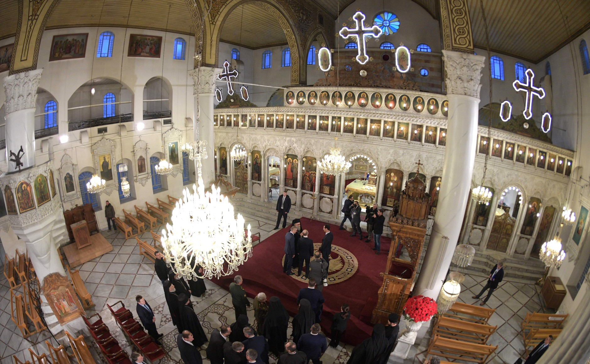 В православной церкви Святой Девы Марии.